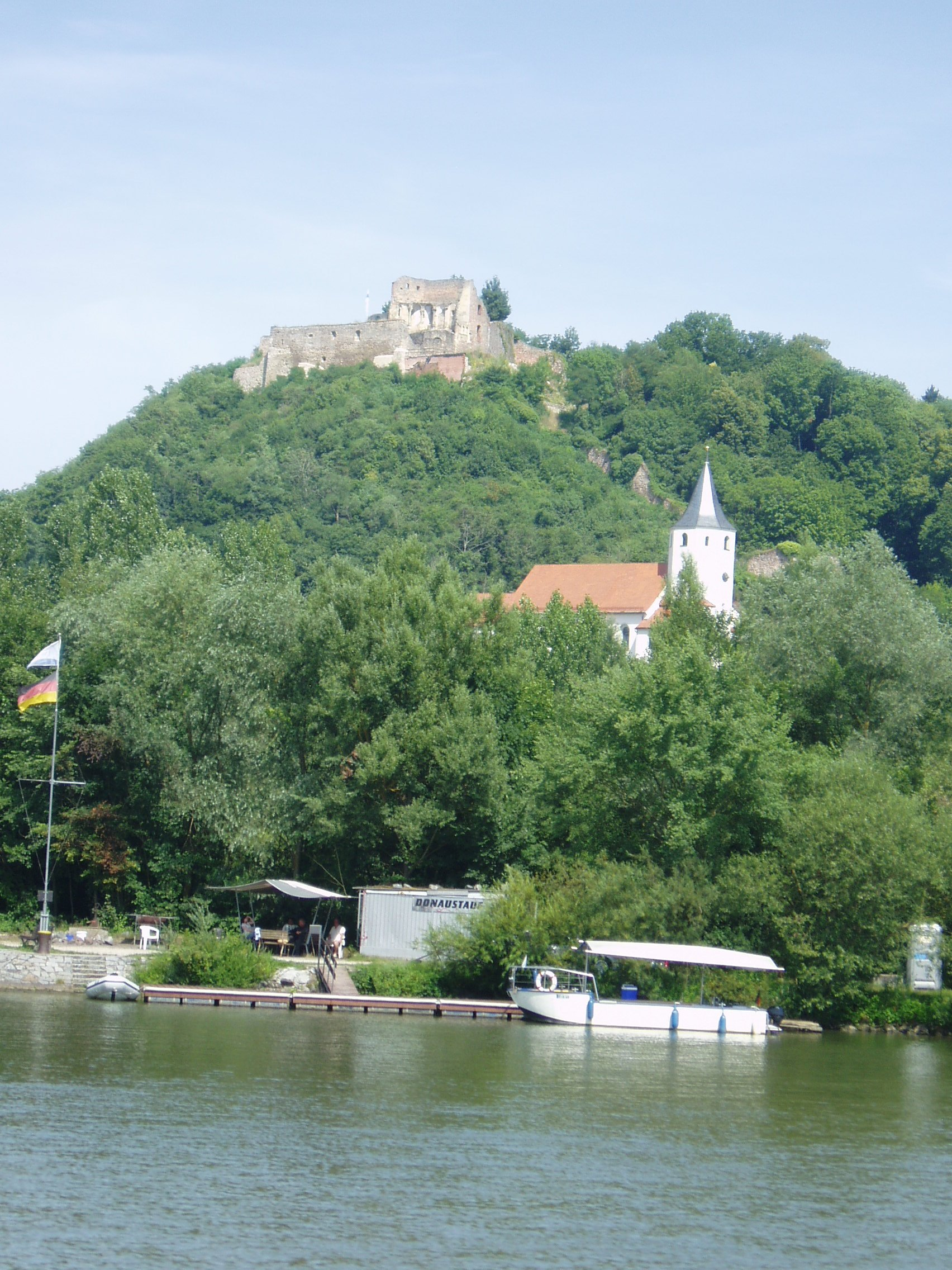 Burg bei Donaustauf